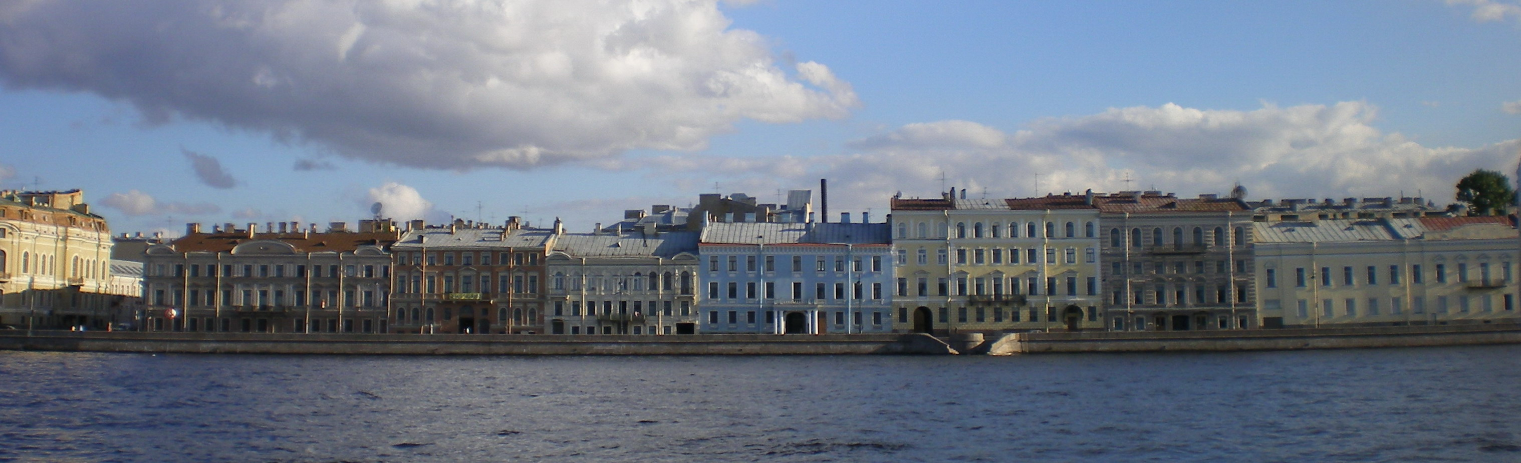 Набережная Кутузова дома 24-34, вид с Невы.